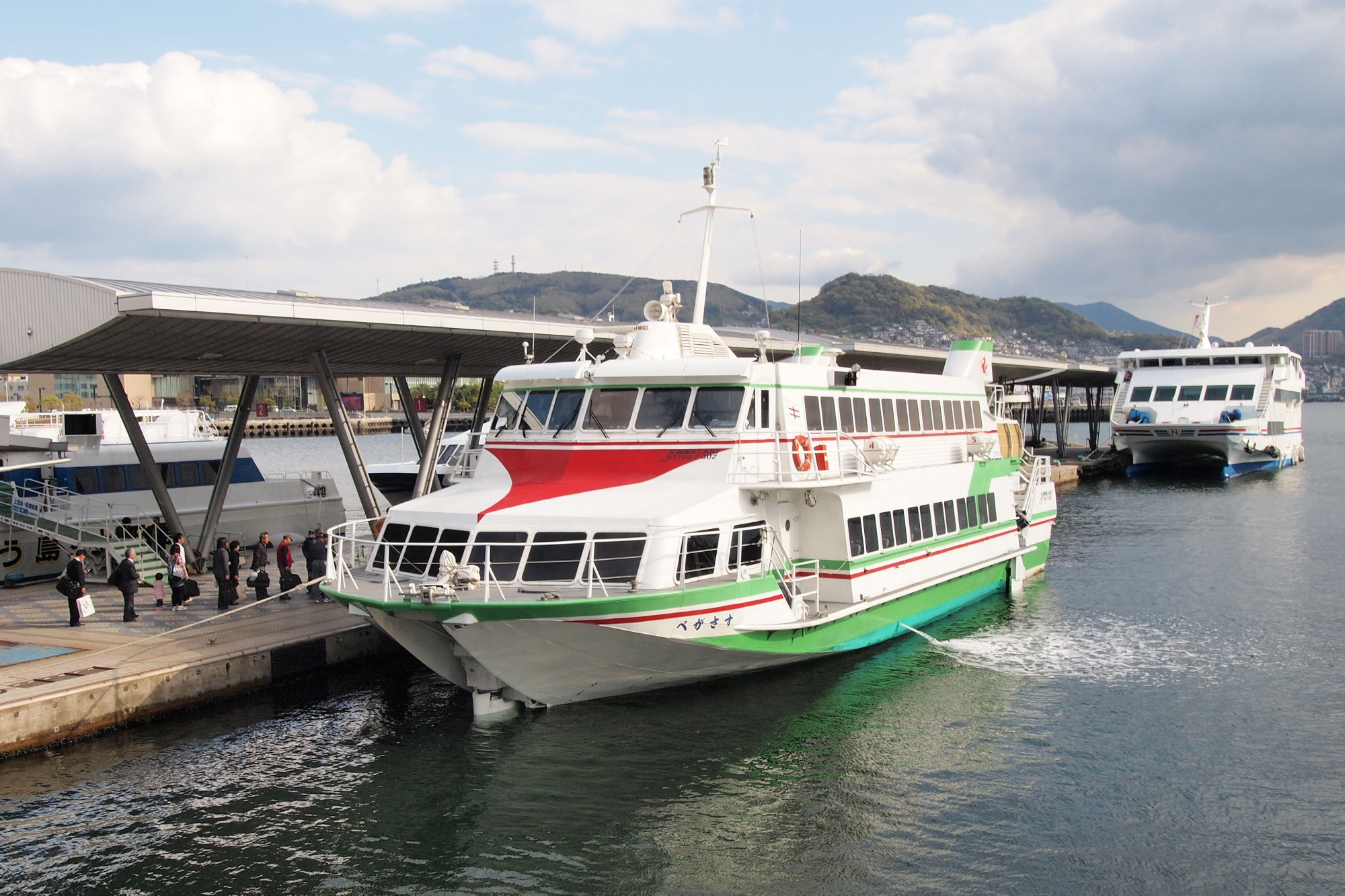 長崎港で出発を待つ旅客船。